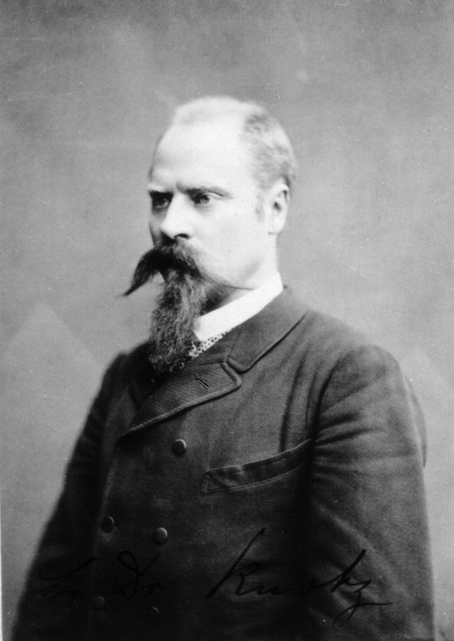 Porträt von Alfred Knotz (* 1844, +1904)